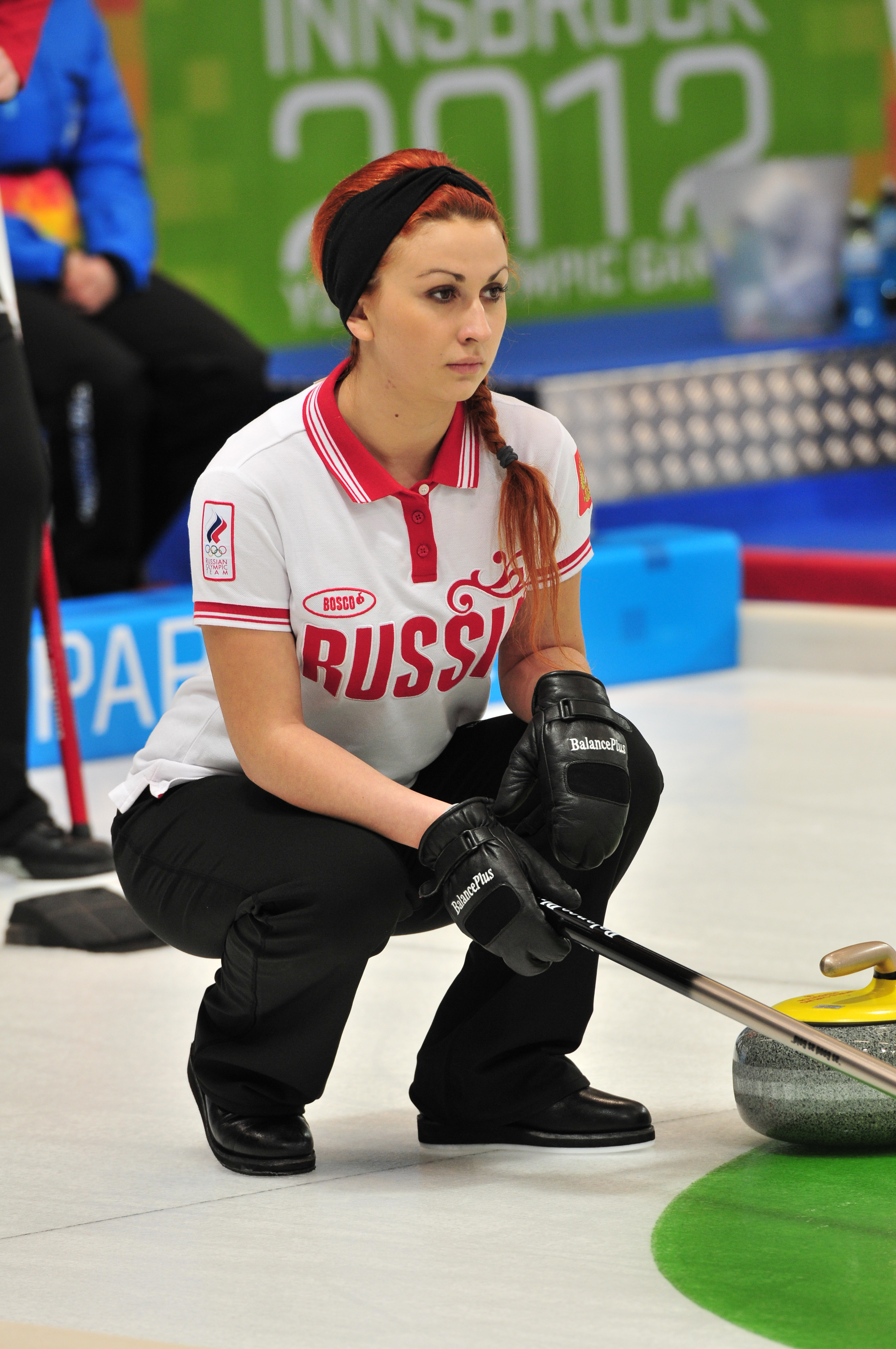 1. Jugendolympiade 2012 Innsbruck Erste Olympische Jugend- Winterspiele 201213. bis 22. Jänner in Innsbruck Dieses Foto wurde durch die Unterstützung von Wikimedia Österreich und die Twoonix Software GmbH ermöglicht.